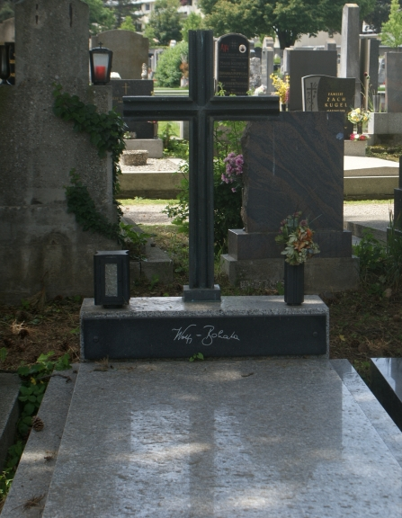 Wiener Südwestfriedhof-Leopold Hlawaty